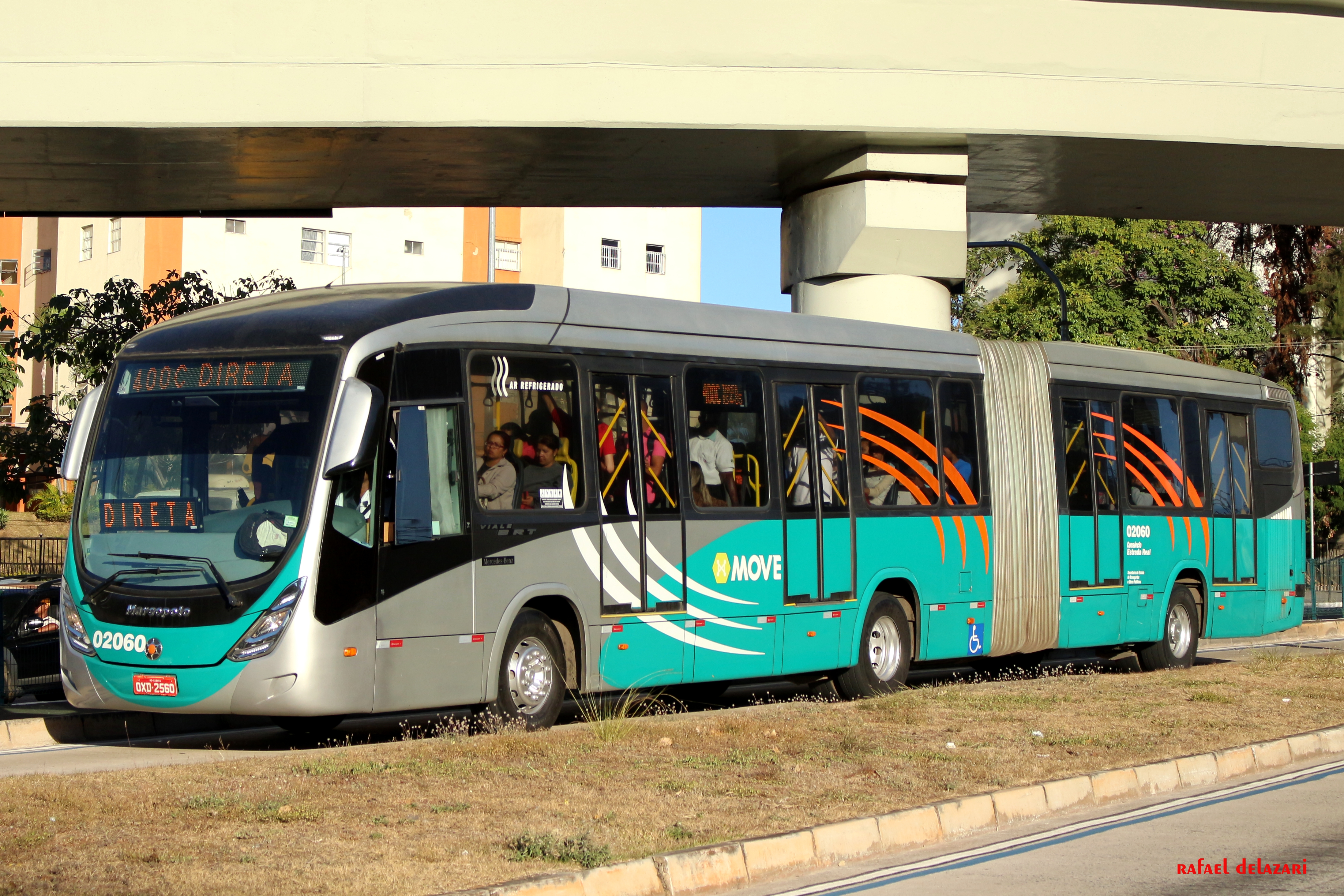 Vianel - 02060